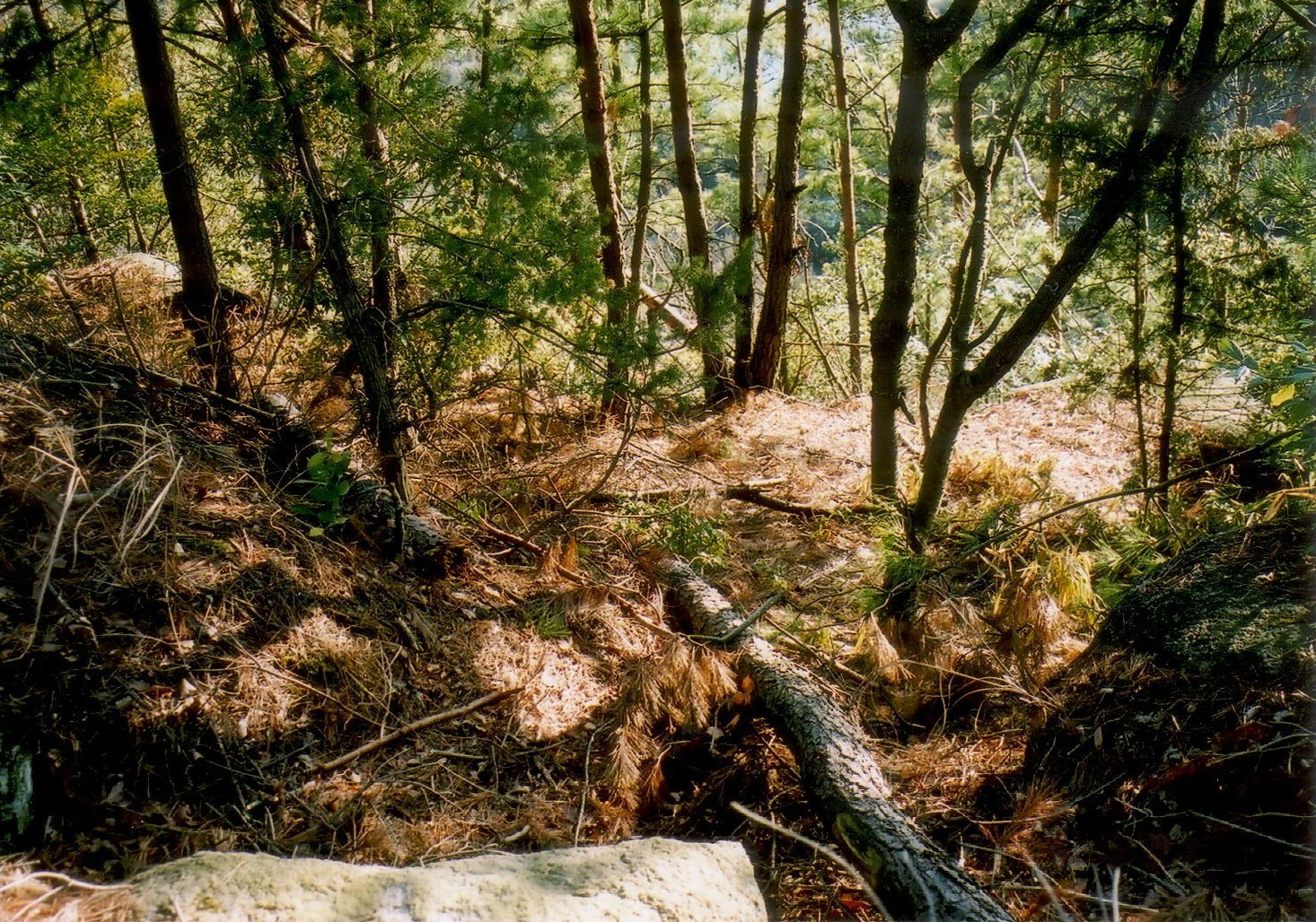 Sj-banyu2